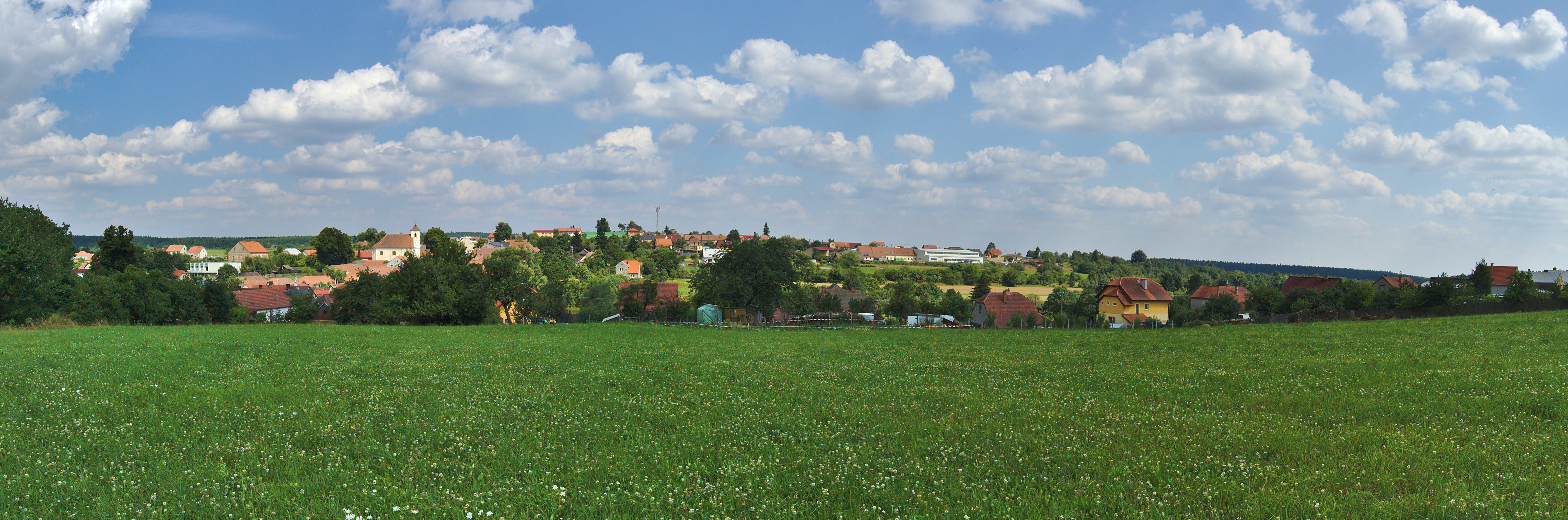 Panoramatický pohled na Žďárnou od cesty na Valchov, okres Blansko